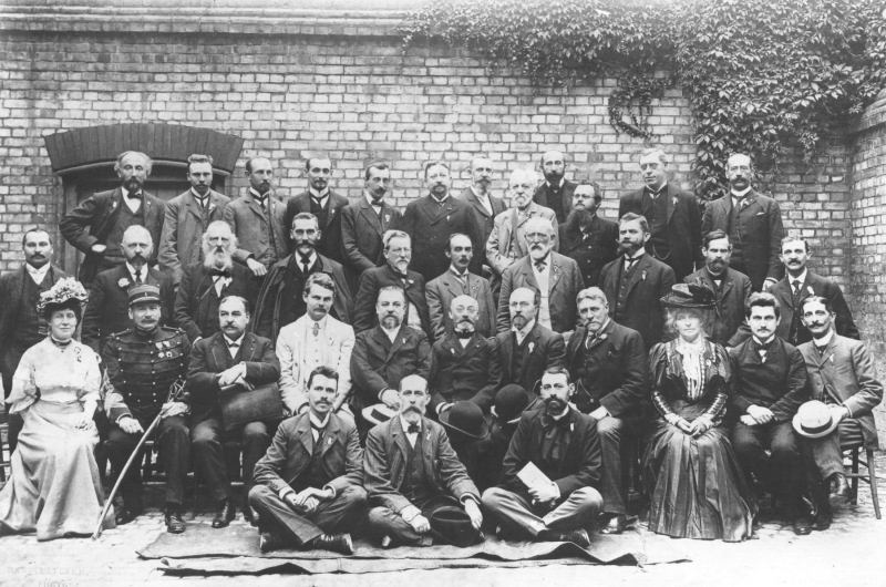 Das "Lingva Komitato". Abgebildet u.a.: Ganz vorne, auf Decke sitzend, v.l.n.r.: Eduard Kühnl, Alfons Sabadell, Samuel Meyer. 1. Reihe auf Stühlen sitzend, v.l.n.r.: Louisa Frederica Adela Schafer, Pierre Ernest Matton, ?, Harold Bolingbroke-Mudie, Hippolyte Sebert, Ludwik L. Zamenhof, ?, John Pollen, Rosa Junck, Kazimierz Bein, Gaston Moch. 2. Reihe, stehend, v.l.n.r.: Th. Renard, Joseph Jamin, Henri Dor, Joseph Rhodes, Theophile Cart, Edward Alfred Millidge, Clarence Bicknell, Per Ahlberg, Paul Gottfried Christaller, A. P. Beauchemin. 3. Reihe, erhöht stehend, v.l.n.r.: Dreves Uitterdijk, Thorsteinn Thorsteinsson, Theodor Cejka, Otto Simon, Johann Schröder, Eduard Mybs, Alfred Michaux, Felix Stone Moscheles, Charles Bourlet, Friedrich Schneeberger, John Ellis